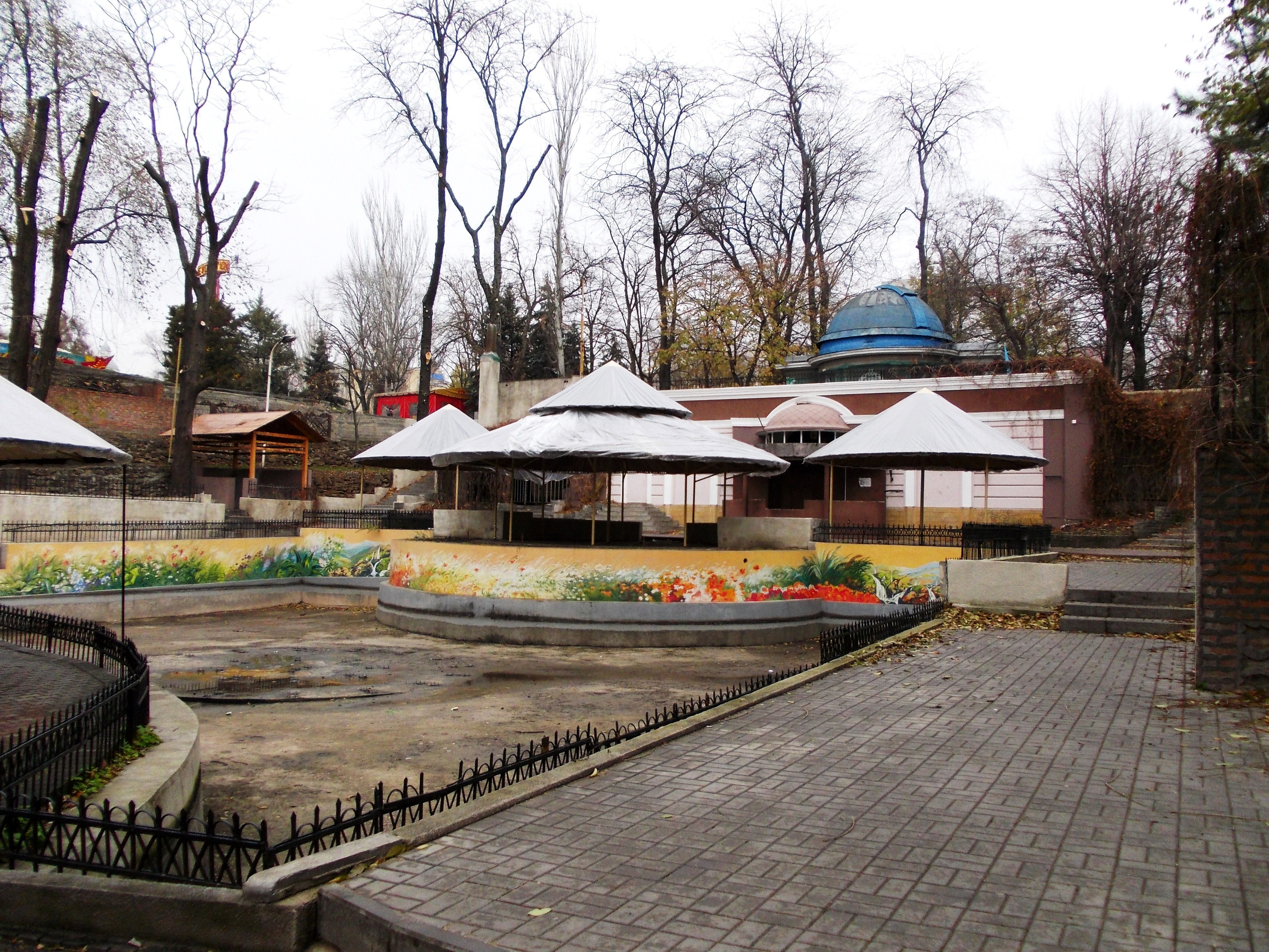 Осень